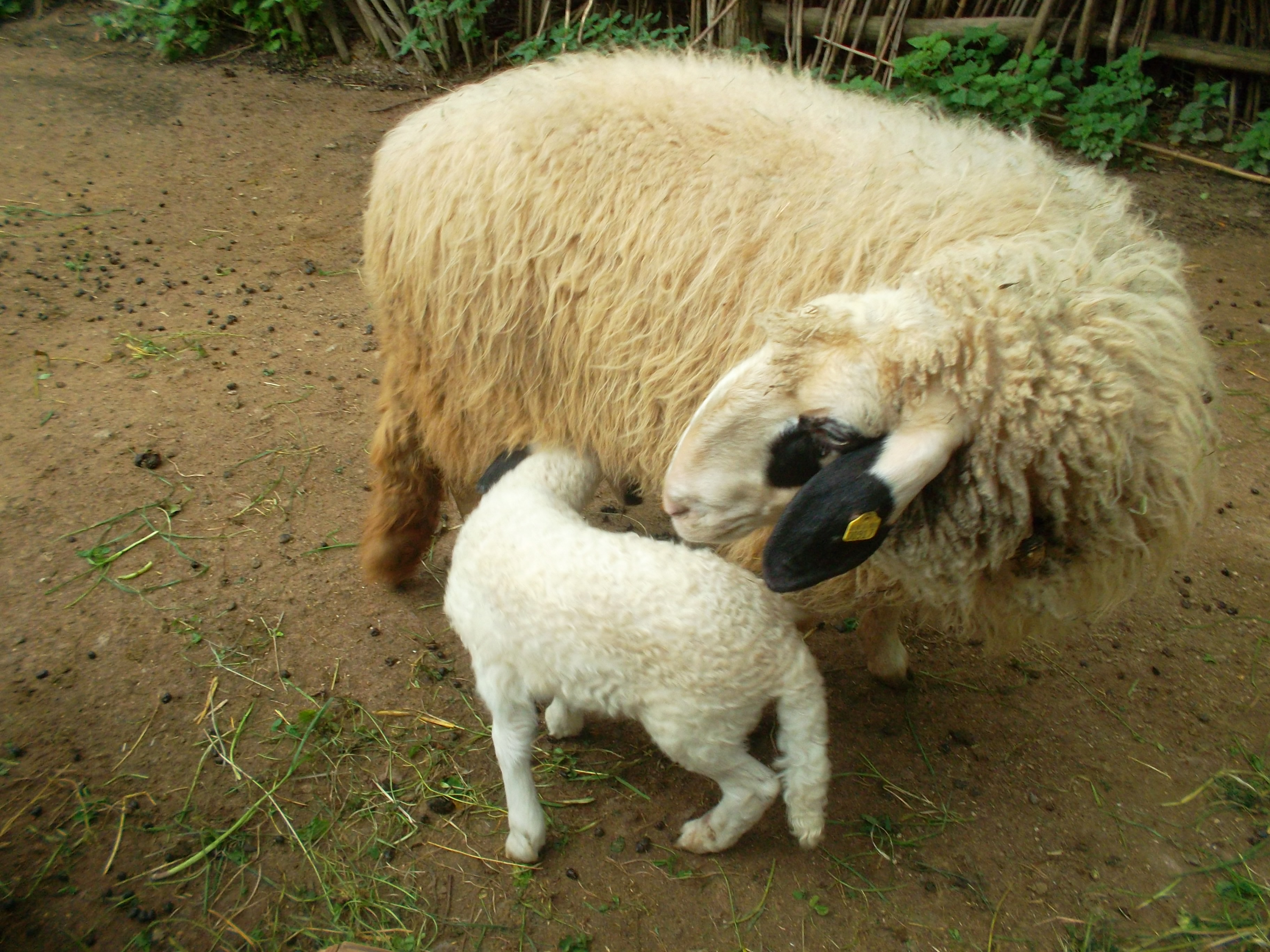 ein Lamm und ein Mutterschaf der Rasse Kärntner Brillenschaf beim Säugen im Tierpark der Stadt Görlitz